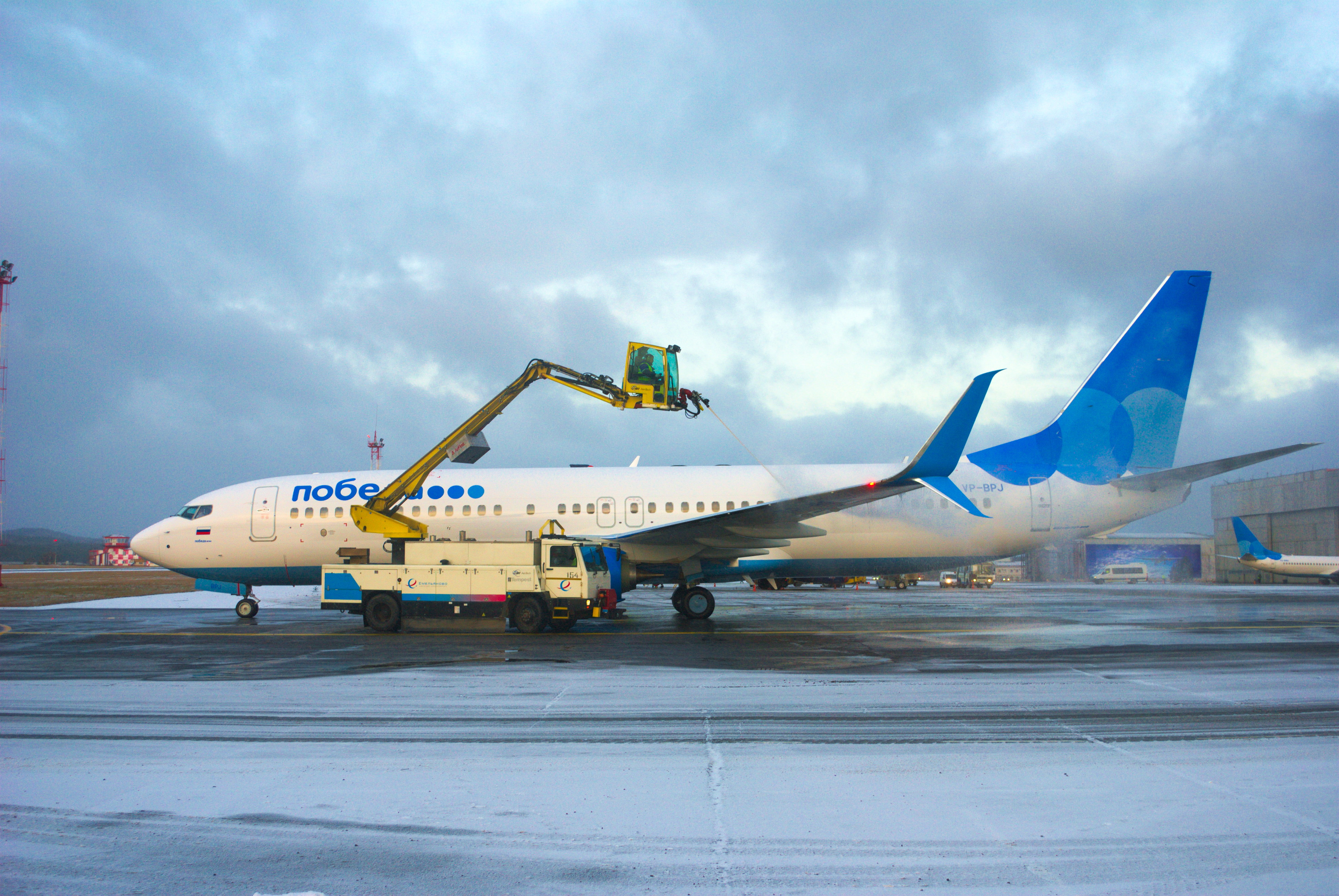 Новый самолёт авиакомпании "Победа" - Boeing 737-800 с законцовками крыла split scimitar, обрабатывается противообледенительной жидкостью в аэропорту Красноярска.